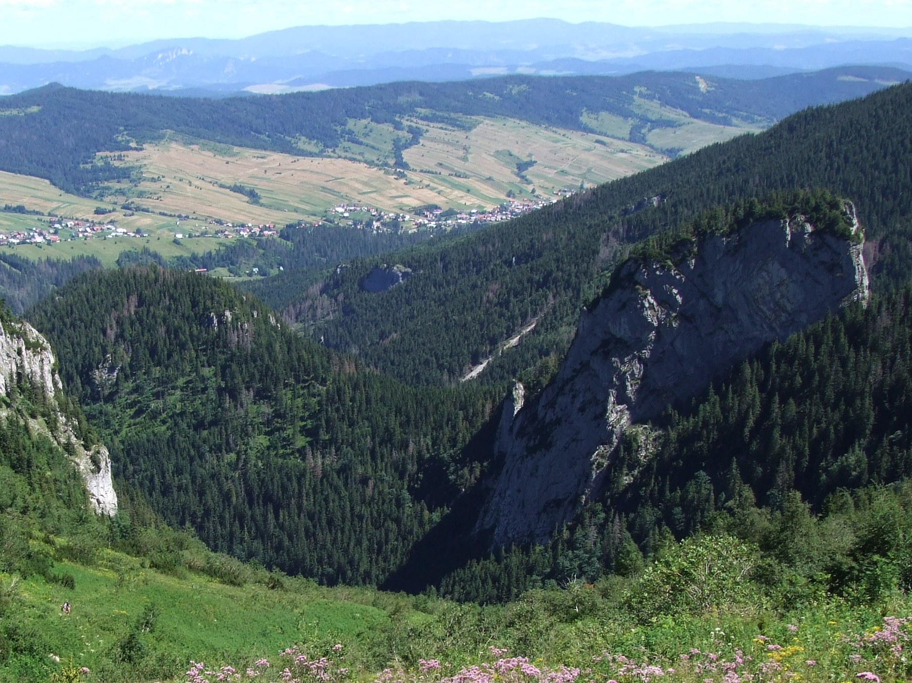 Od lewej:śtoki Płaczliwej Skały,Opalona Turnia, Opalone Siodło, Łasztowica. W dole Zdziar. Widok z Doliny Szerokiej Bielskiej